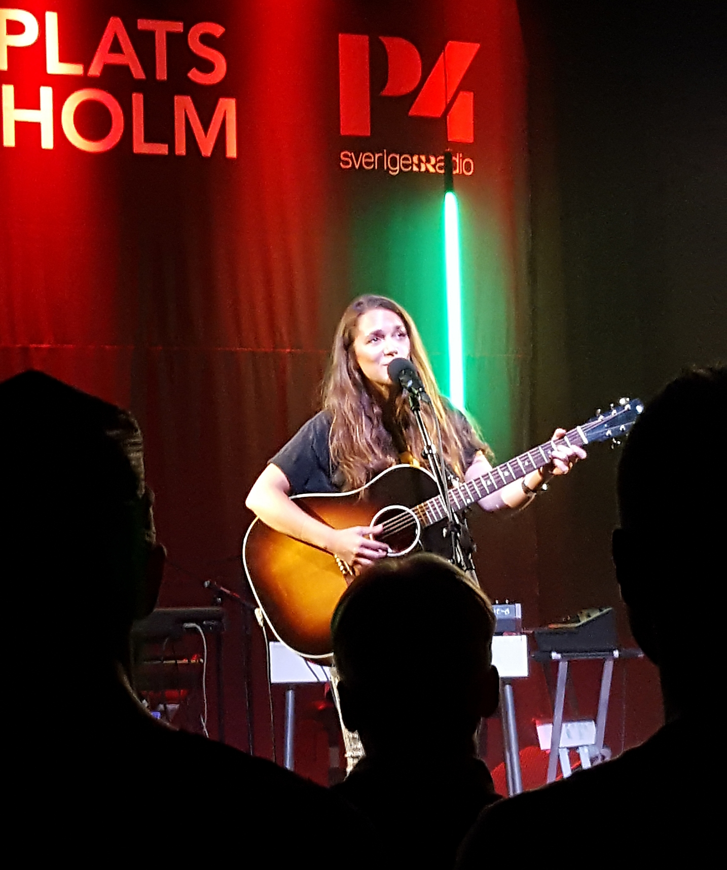 Musikplats Stockholm, 13 september 2019. Foto: Tomas Nilsson